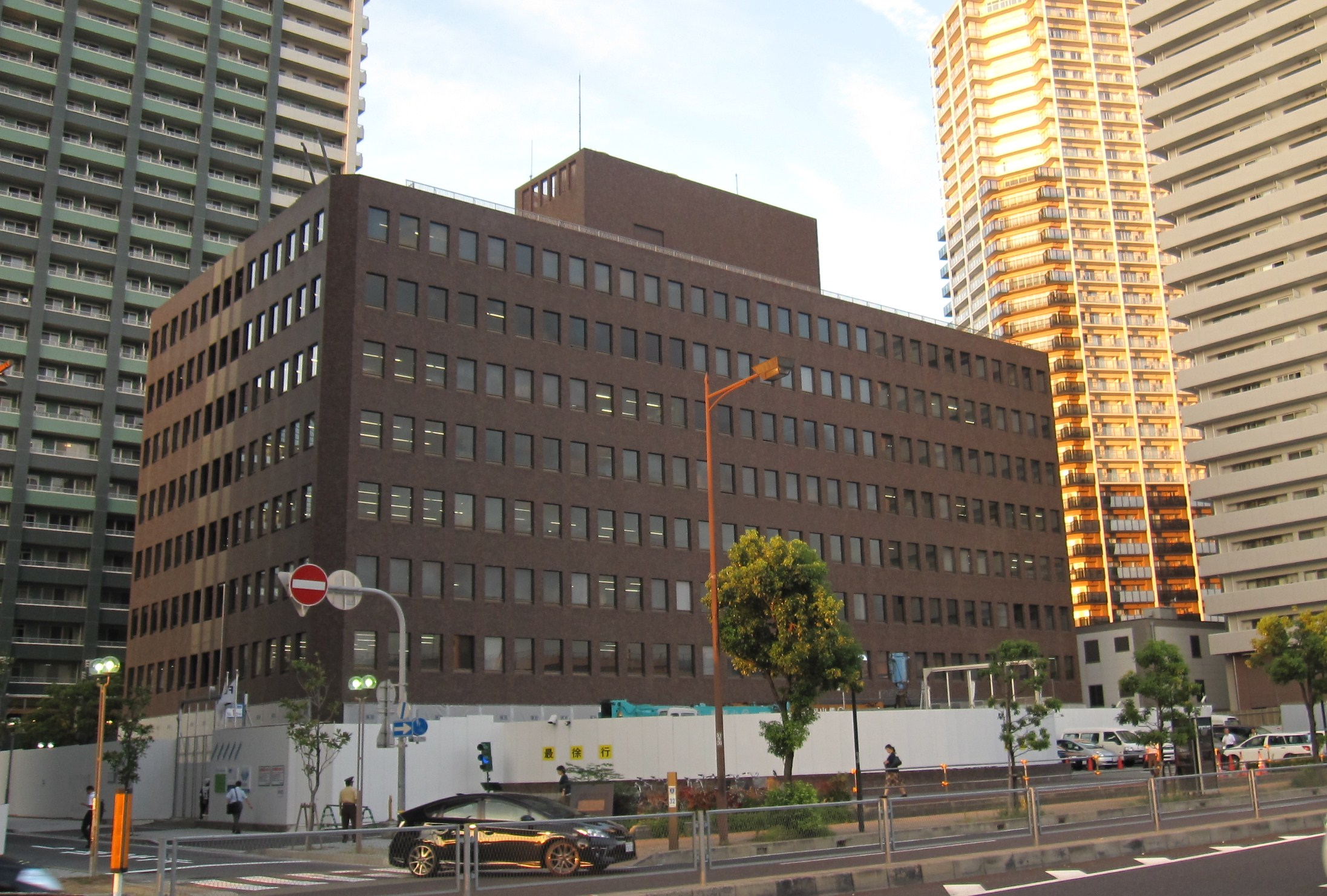 神戸第一地方合同庁舎（入居官署一覧）